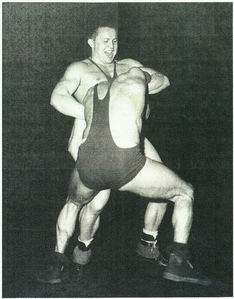 Mecz ligowy Skra Warszawa - Drukarz Warszawa, skan archiwalny.